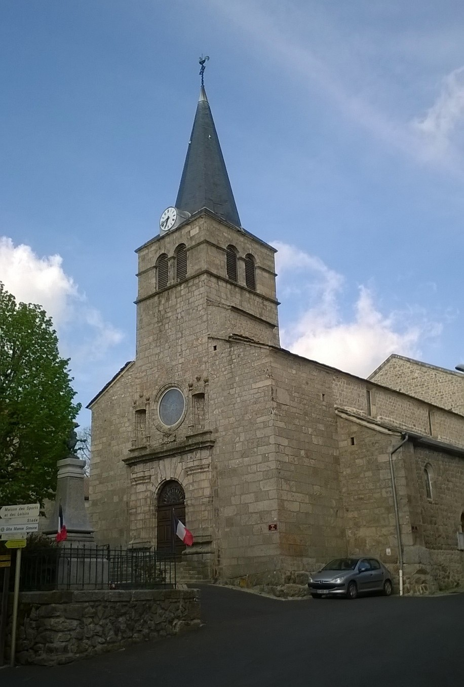 montregard13